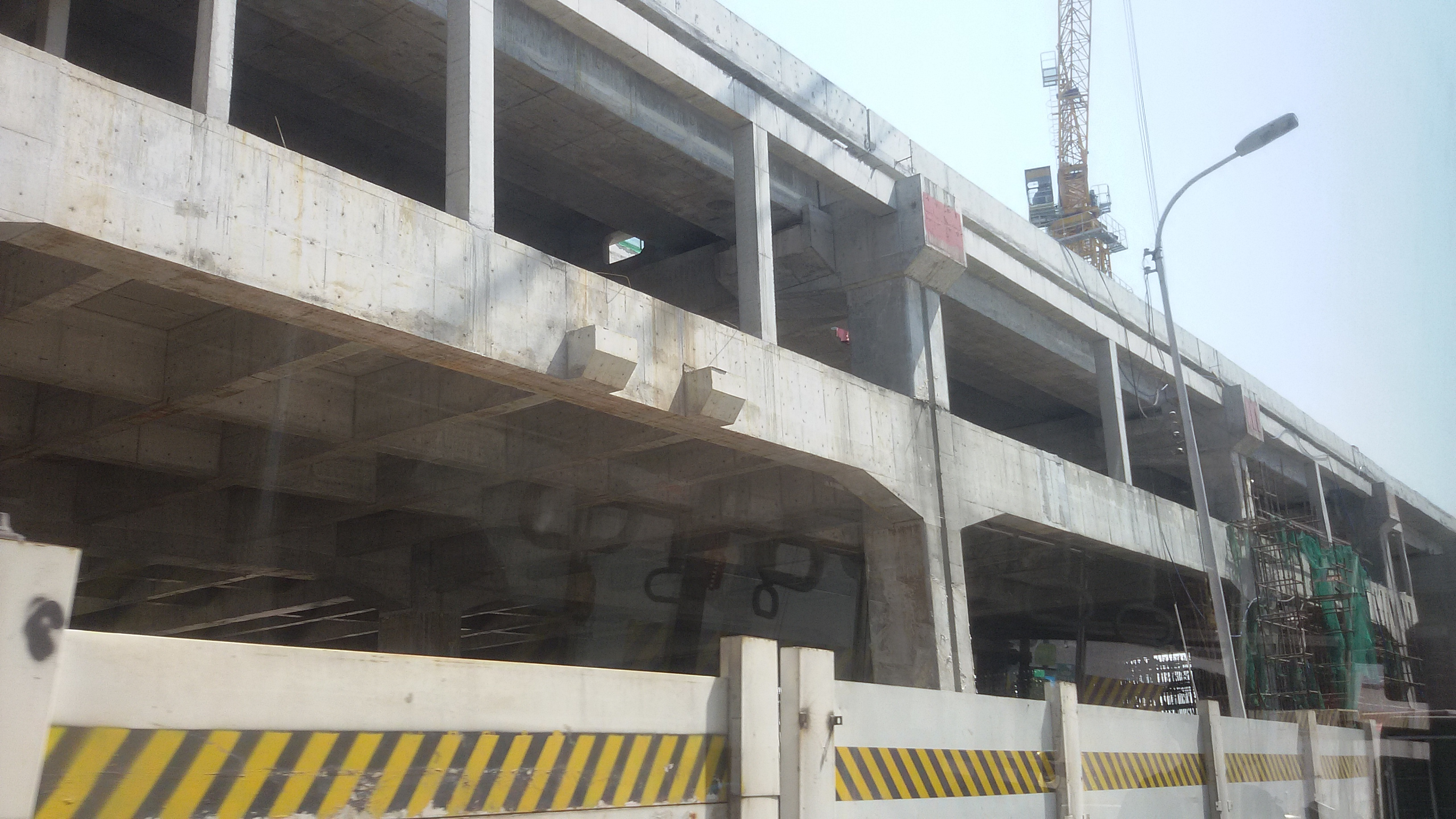 粵語: 2018年4月8號，鐘落潭站重喺度起緊，嗰時已經起到見到月台同站廳嘅基本結構。